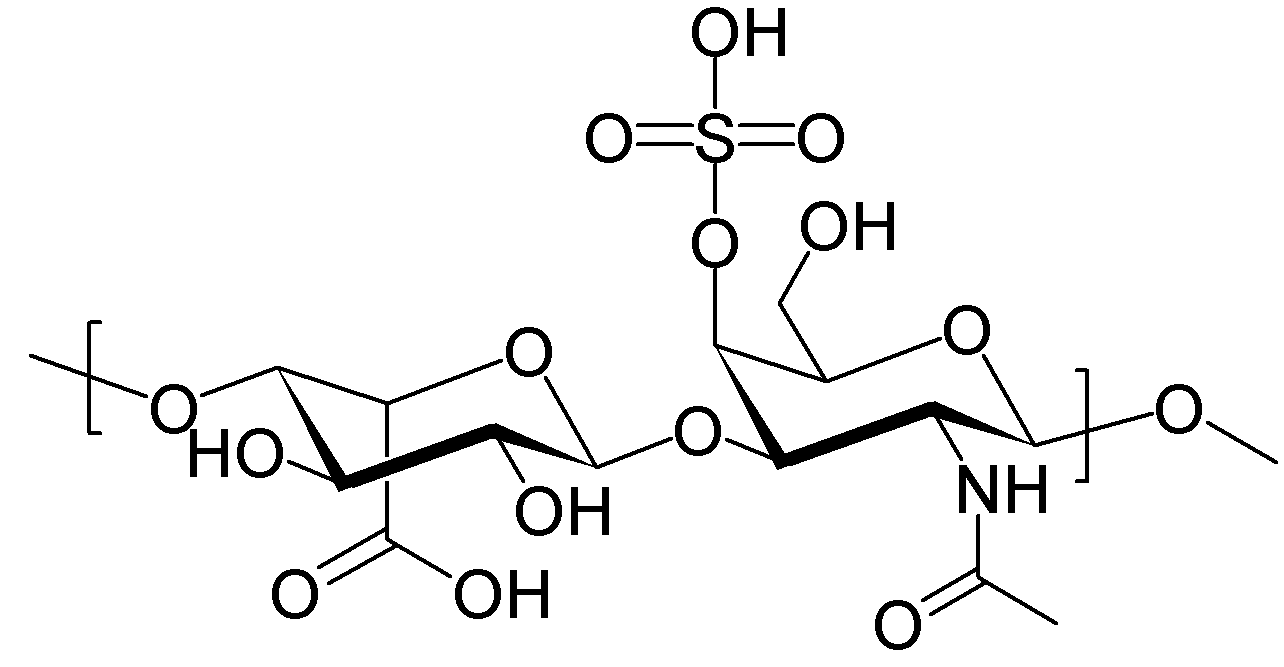 Akane700作成。